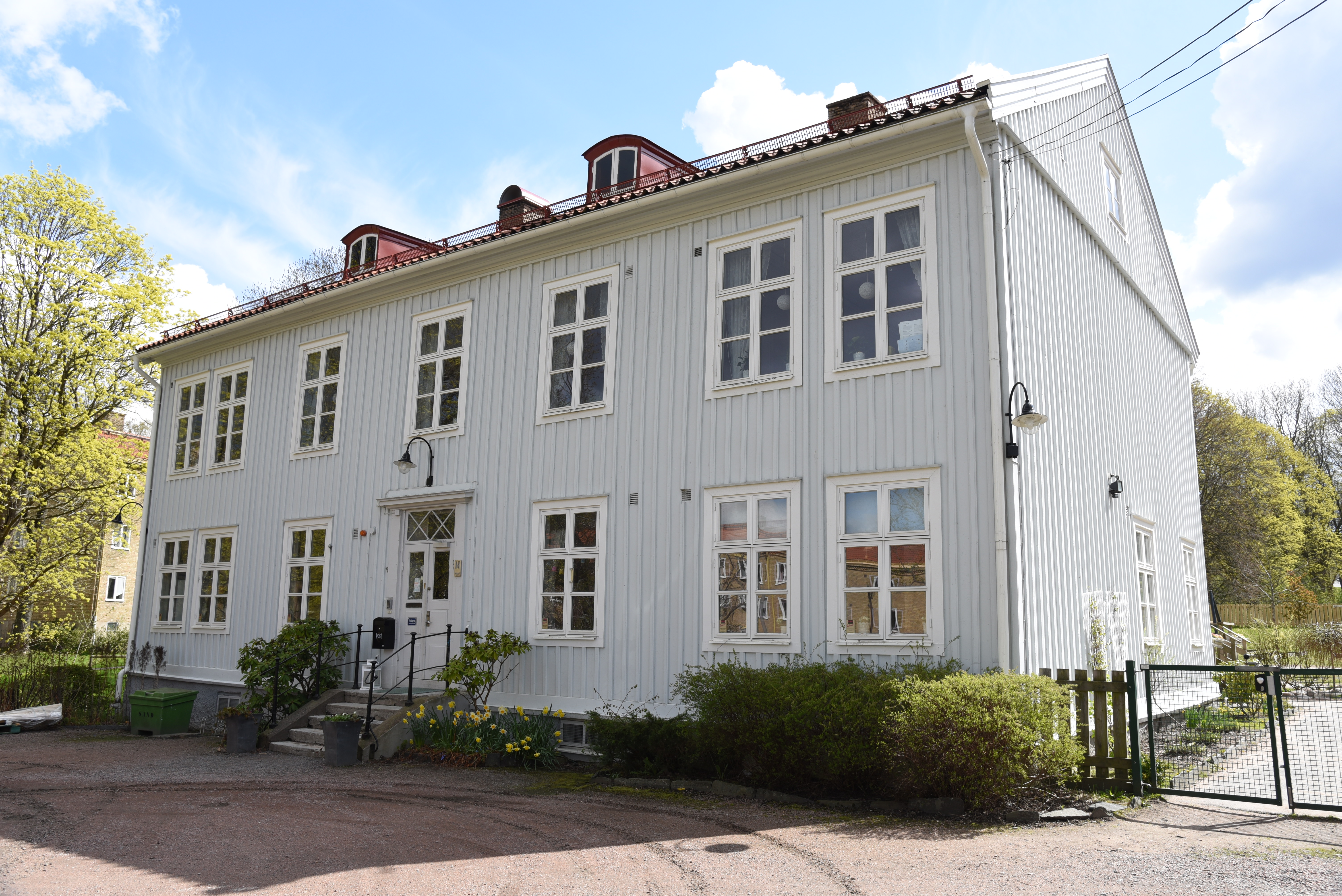 Vidkärrs gård i stadsdelen Sävenäs i Göteborg. Huvudbyggnaden.